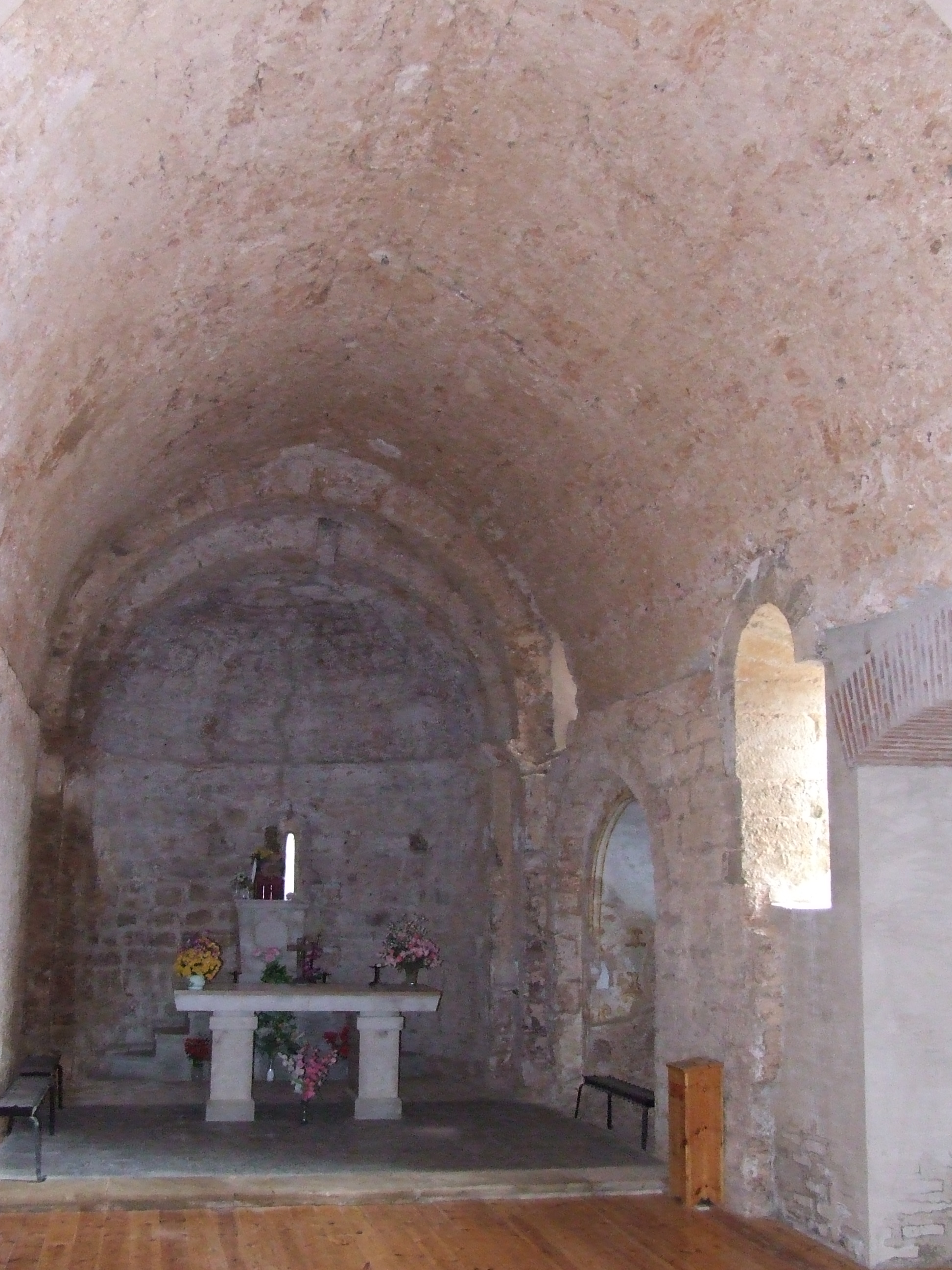 Interior de la Mare de Déu de Bonrepòs (Sant Salvador de Toló, Gavet de la Conca, Pallars Jussà)